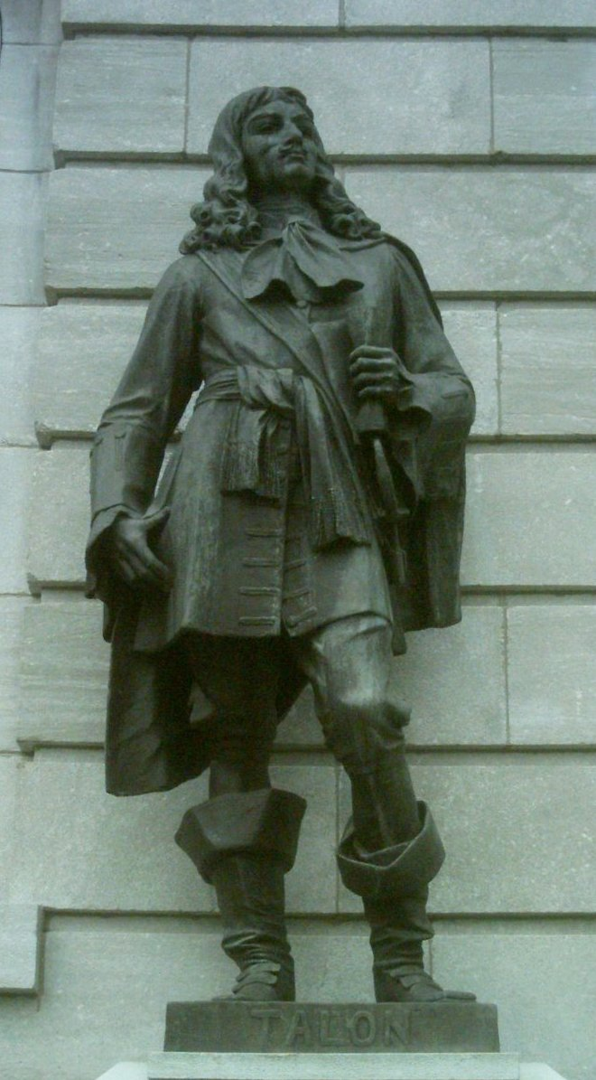 Jean Talon (1625-1694), statue de la façade de l'hôtel du Parlement, Québec